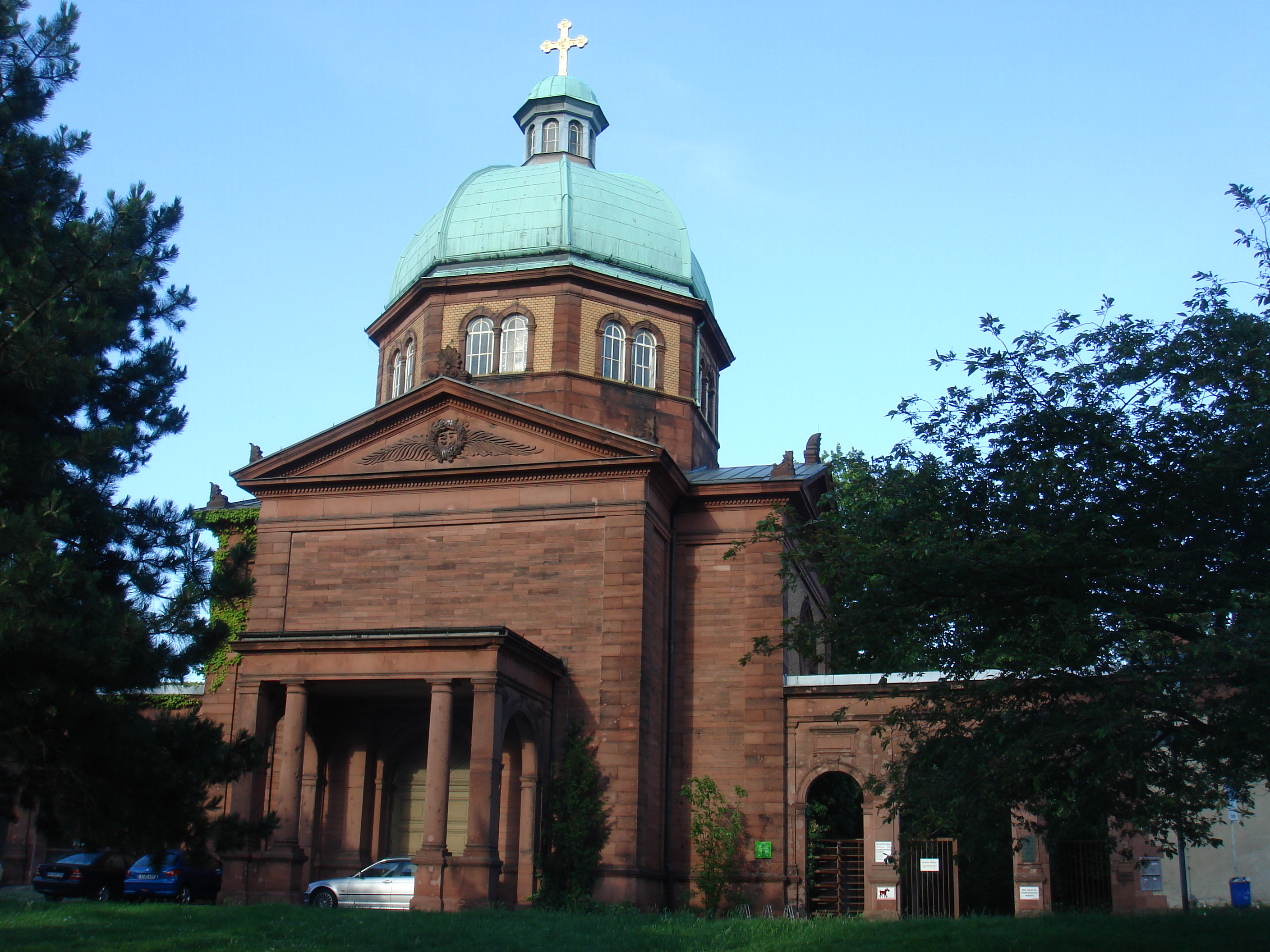 Südfriedhof Frankfurt Sachsenhausen, Eingangsgebäude, Cemetery, Germany